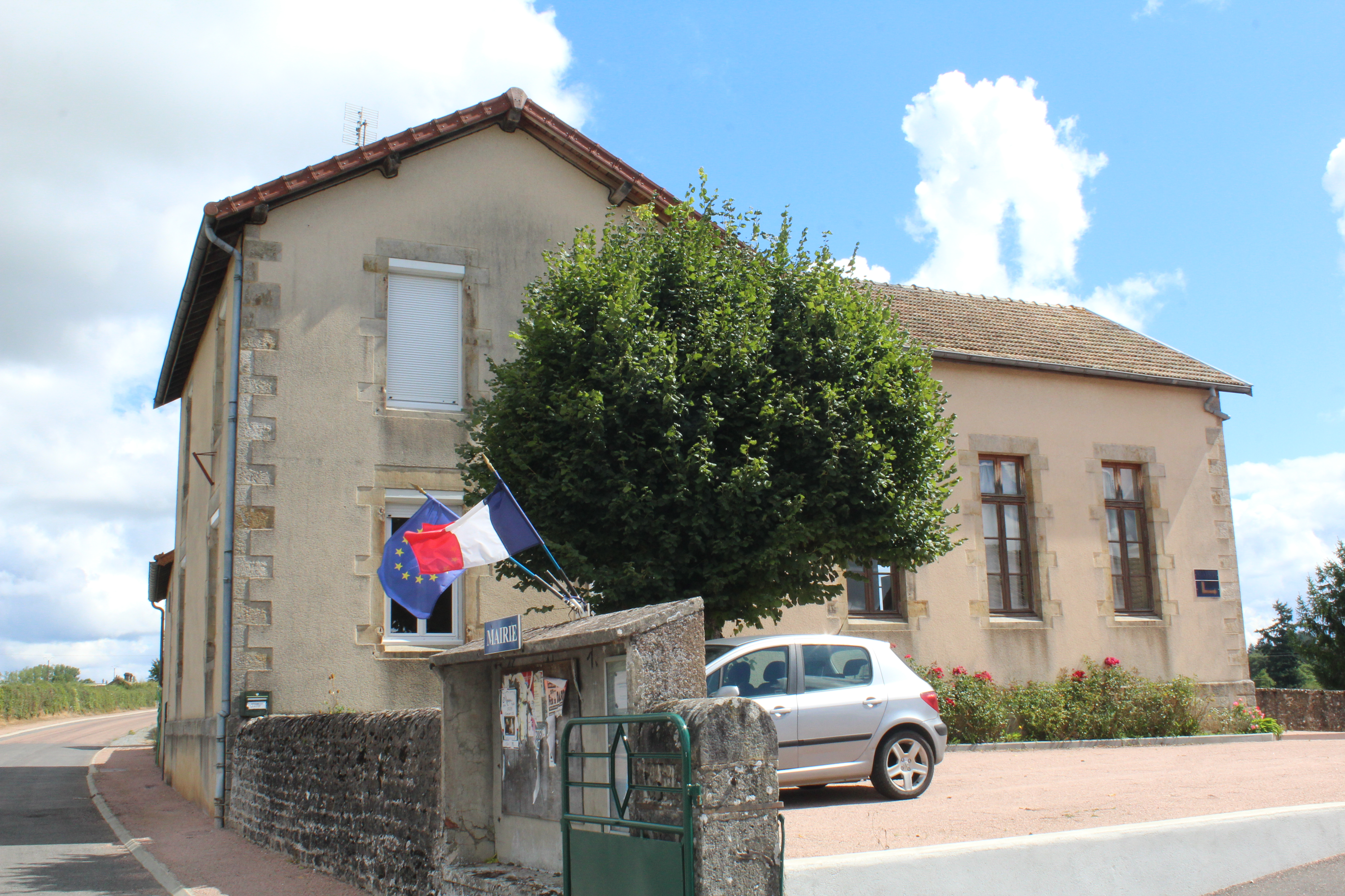 Mairie de Mornay, Saône-et-Loire.